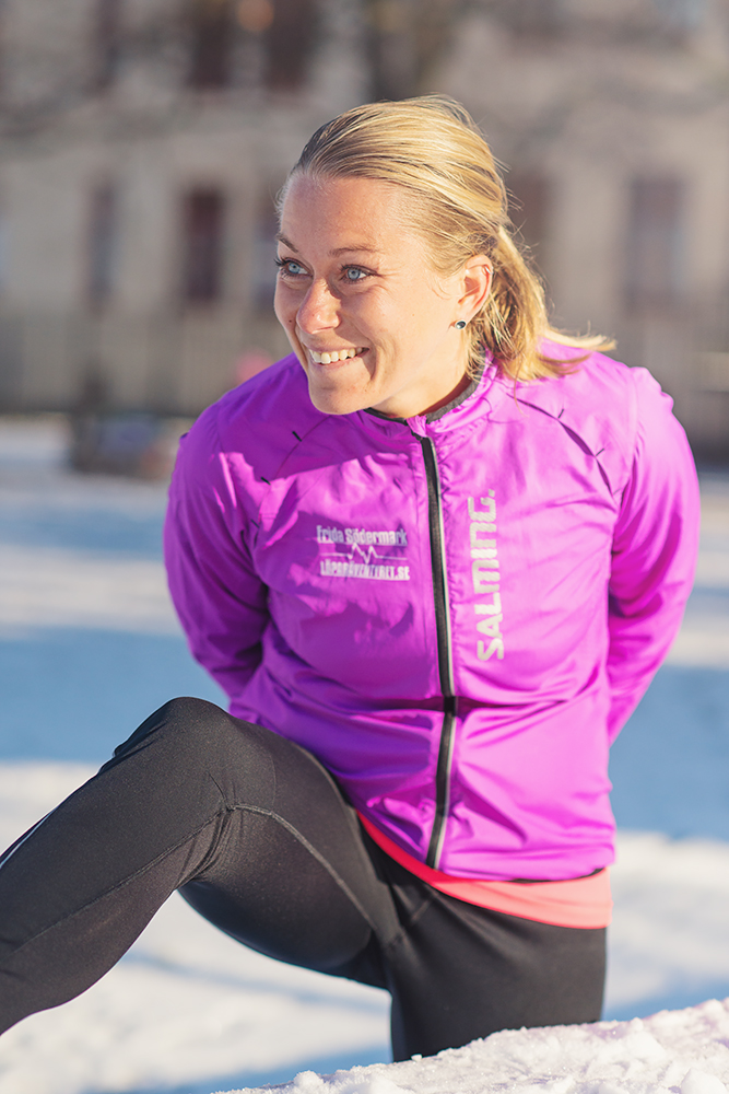 Frida Södermark Ultralöpare